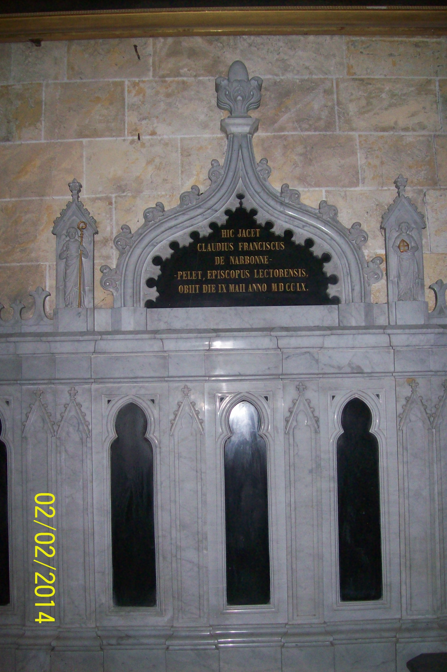 Chapelle funéraire de Claude-François de Narbonne-Pelet, cathédrale Saint-Gervais-Saint-Protais de Lectoure (Gers).